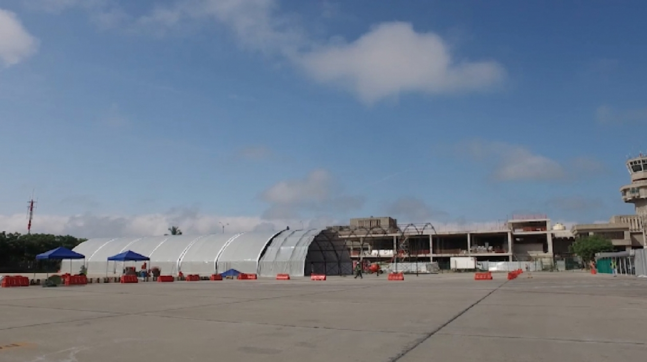 Nuevo hangar para zona de check-in y obras de remodelación Aeropuerto Enrnesto Cortissoz